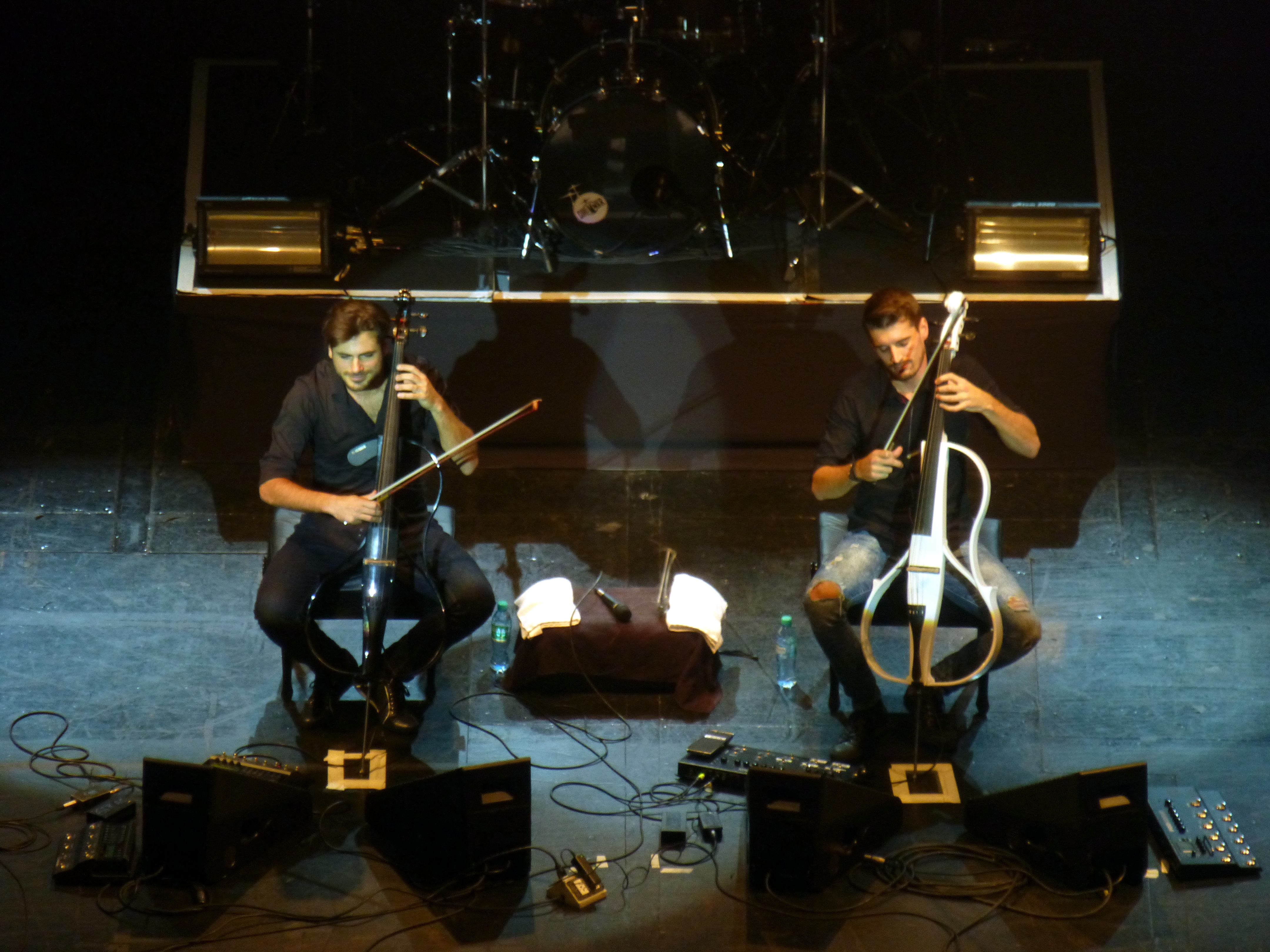 El dúo esloveno-croata 2CELLOS en su presentación en el Teatro Gran Rex de la ciudad de Buenos Aires, Argentina.